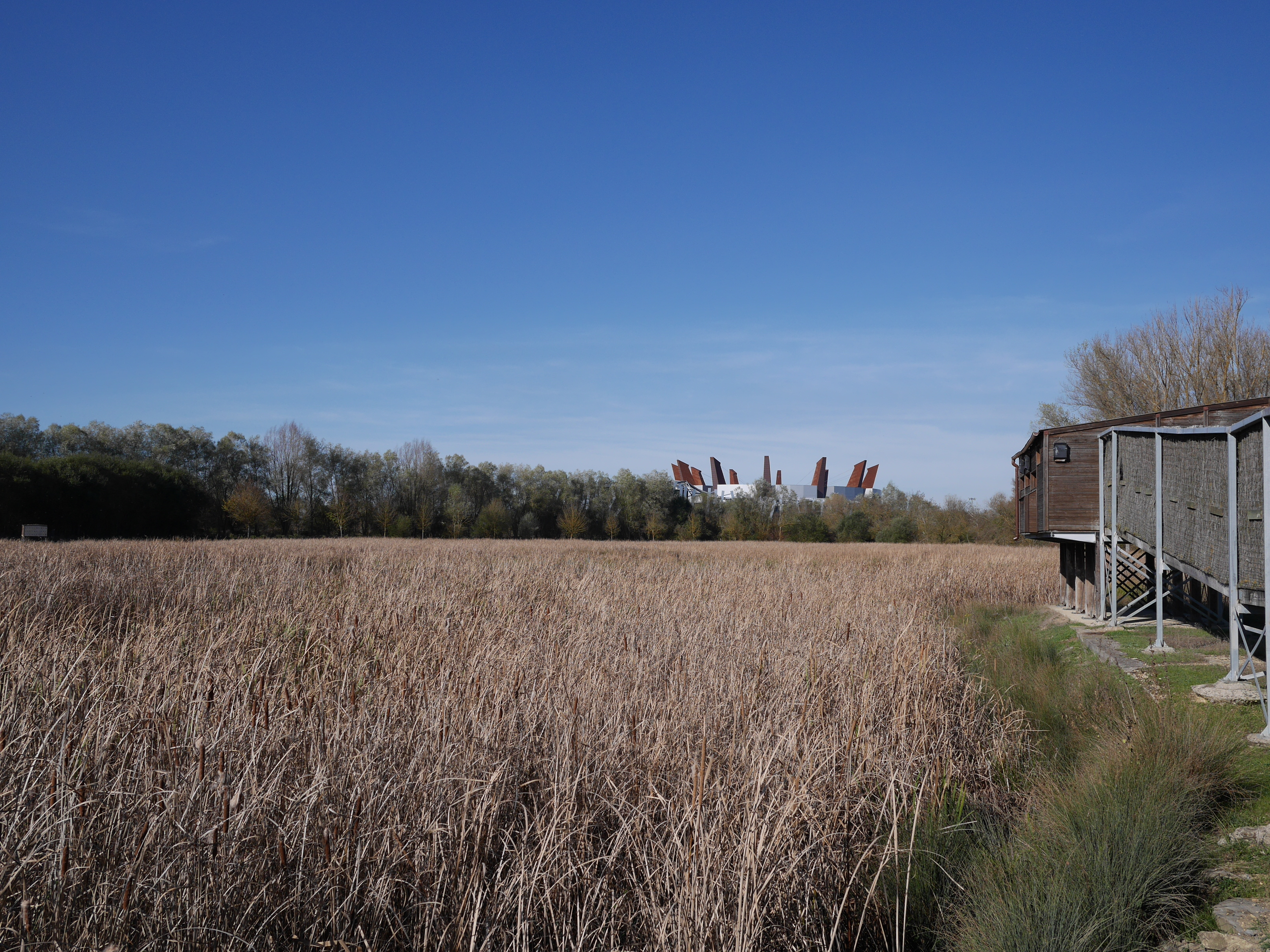 Humedal de Salburua, mirador del humedal y estadio de baloncesto de Laboralkutxa Baskonia "Buesa Arena", Salburua, Vitoria-Gasteiz, Álava, País Vasco, España This is a photography of a Site of Community Importance in Spain with the ID: ES2110014. Natura2000 entry, EEA entry